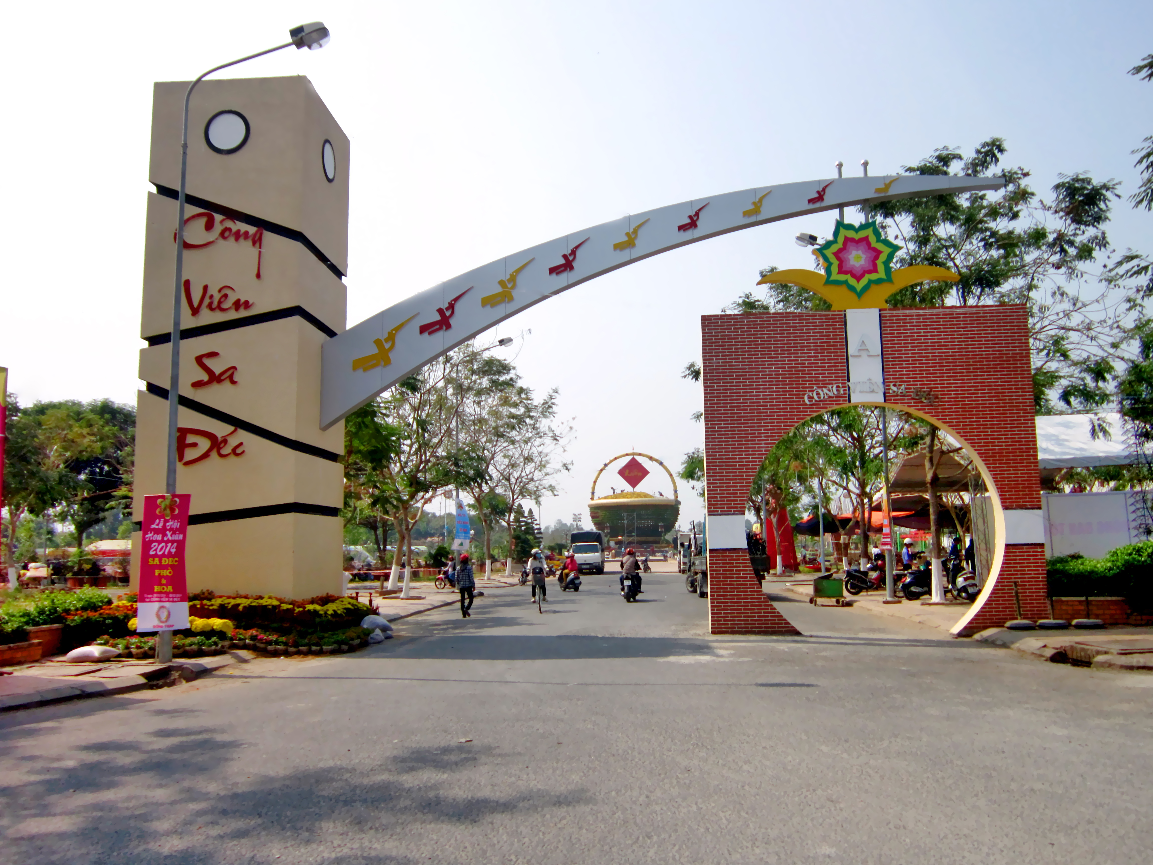 Công viên Sa Đéc ở phường An Hòa, thành phố Sa Đéc (Đồng Tháp, Việt Nam) đang đón chào năm mới xuân Giáp Ngọ (2014).